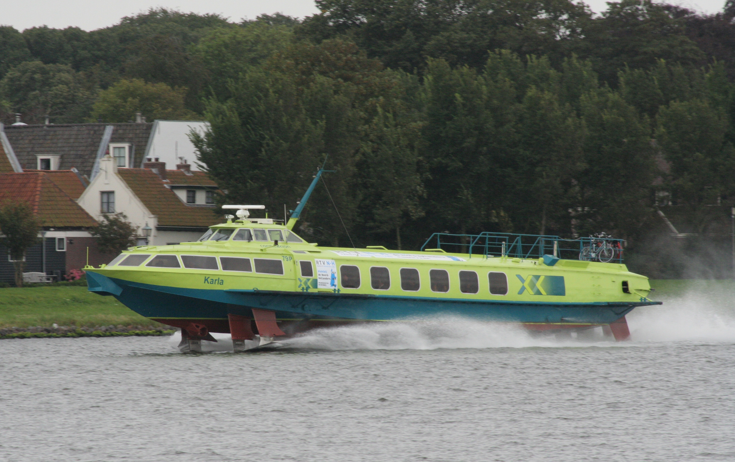 Fast Flying Ferries van Connexxion in Velsen in the Netherlands.